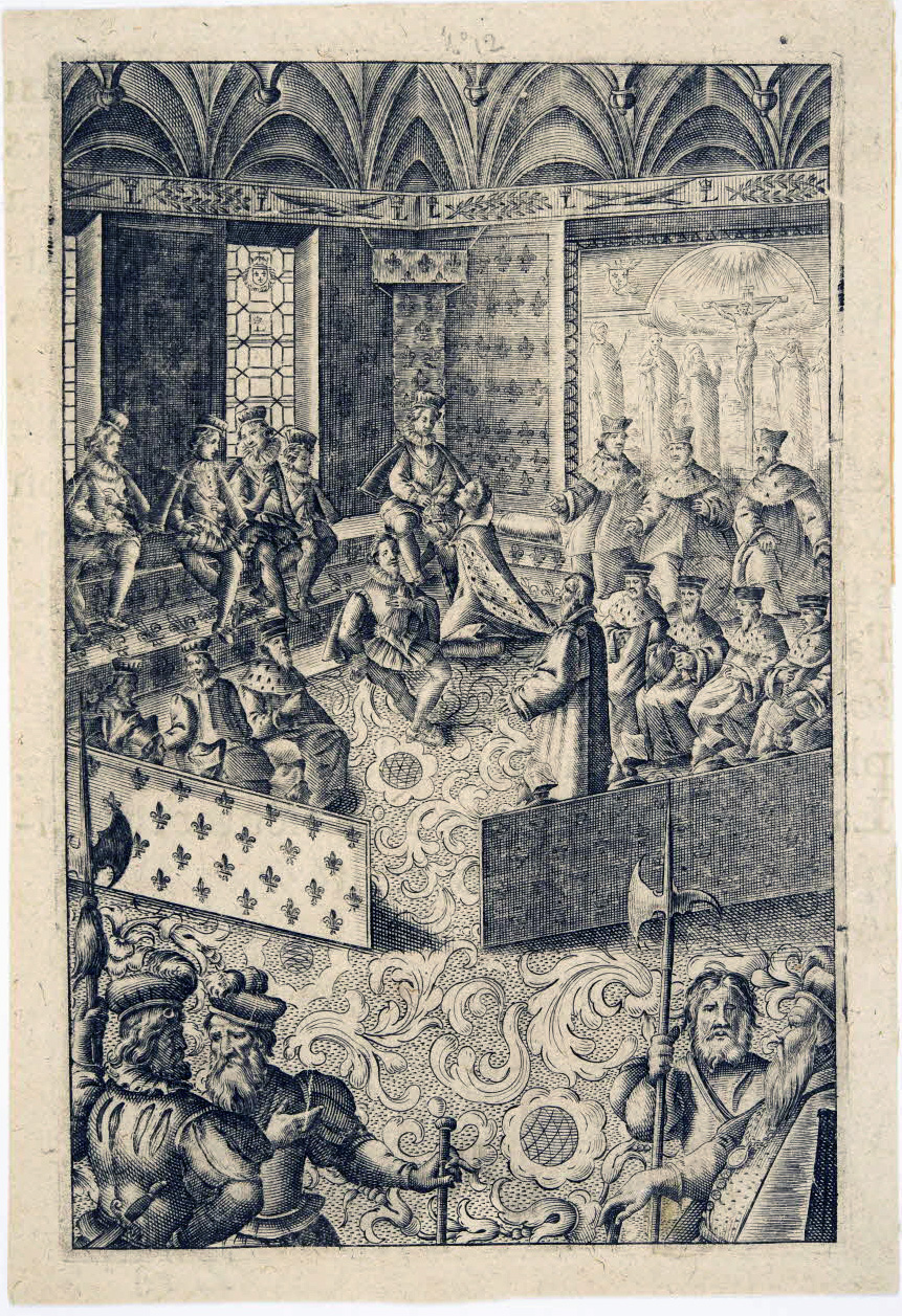 Lit de justice tenu par Louis XIII au Parlement de Paris le lendemain de la mort de Henri IV son père. 15 mai 1610